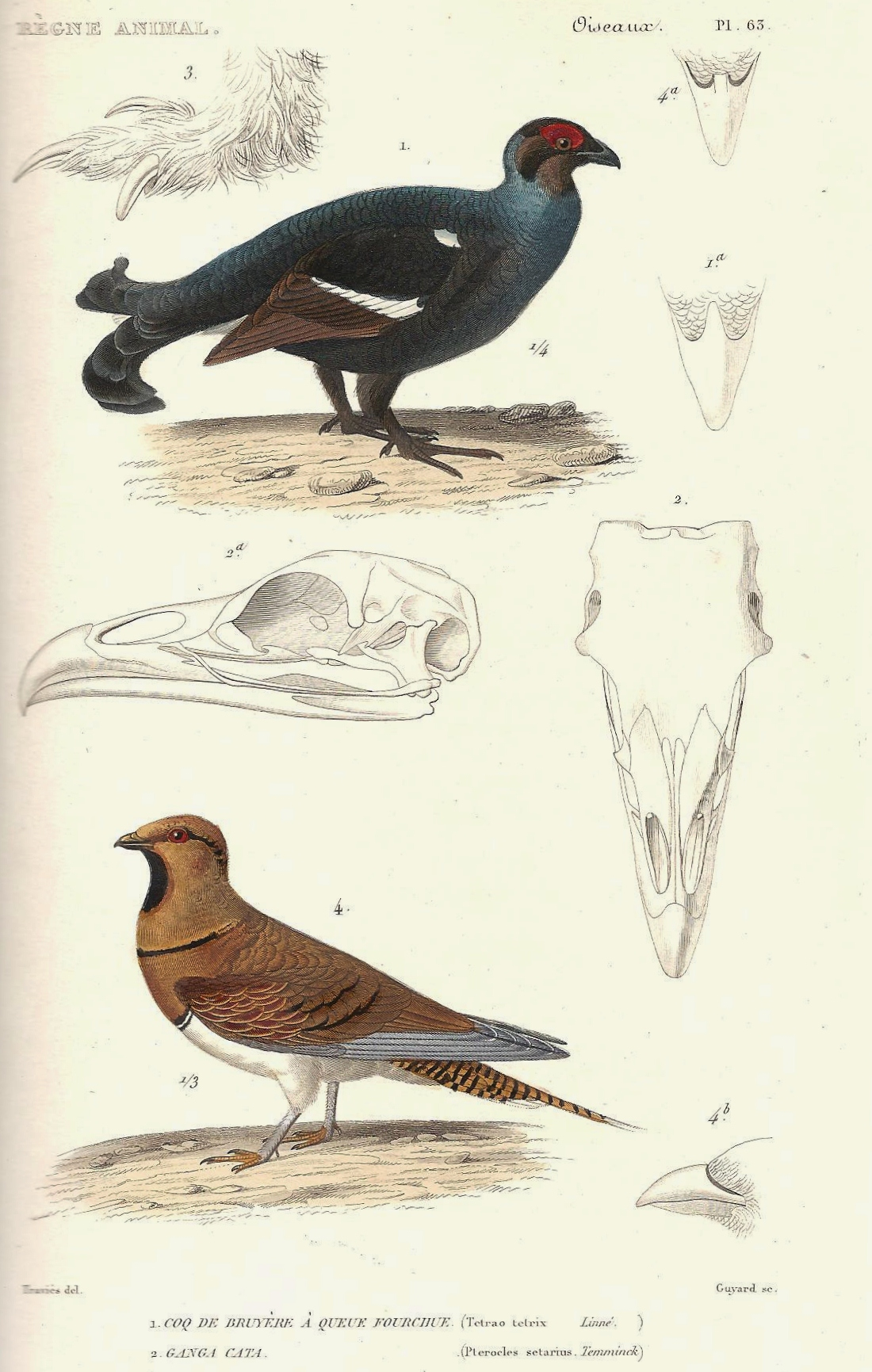 Planche N°63 dessinée par Edouard Traviés provenant du livre "Le règne animal distribué d'après son organisation" par Georges Cuvier (Tome 4), seconde édition de 1828, représentant : -en haut : Coq de bruyère (Tetrao urogallus) -en bas : Ganga cata (Pterocles alchata)